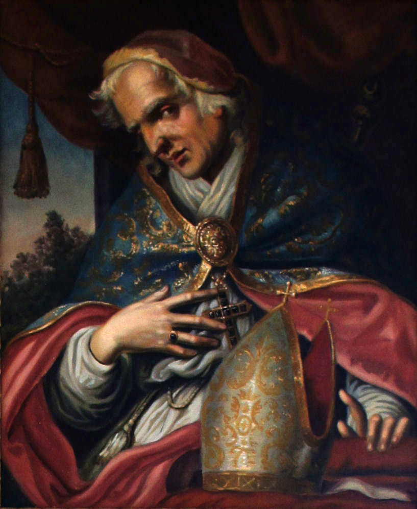 Porträtgemälde von Johann IV. Tulbeck, Fürstbischof von Freising, im Fürstengang zwischen Fürstbischöflicher Residenz und Freisinger Dom.